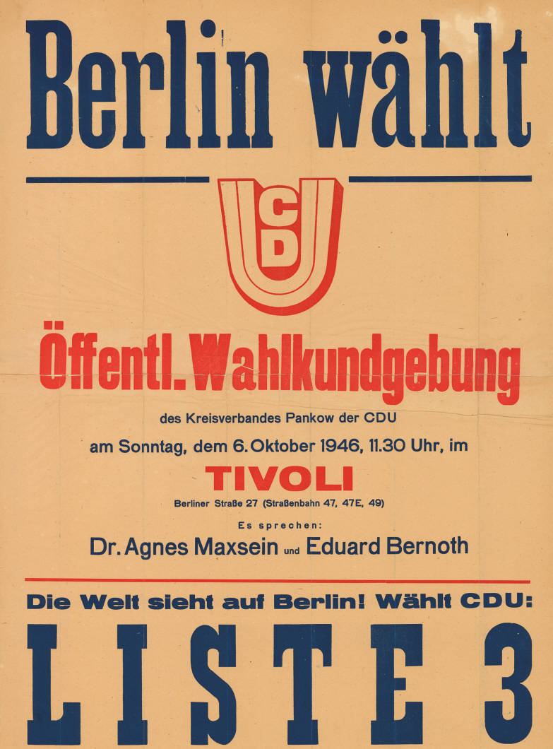 Berlin wählt CDU Öffentl. Wahlkundgebung des Kreisverbandes Pankow der CDU ... Es sprechen: Dr. Agnes Maxsein und Eduard Bernoth Die Welt sieht auf Berlin! Wählt CDU: Liste 3 Abbildung: CDU-Logo Kommentar: Ein Exemplar ist seitlich beschnitten. Plakatart: Ankündigungsplakat Auftraggeber: KV Pankow Objekt-Signatur: 10-004 : 1 Bestand: Plakate zu Abgeordnetenhauswahlen Berlin (10-004) GliederungBestand10-18: Plakate zu Abgeordnetenhauswahlen Berlin (10-004) » CDU Lizenz: KAS/ACDP 10-004 : 1 CC-BY-SA 3.0 DE